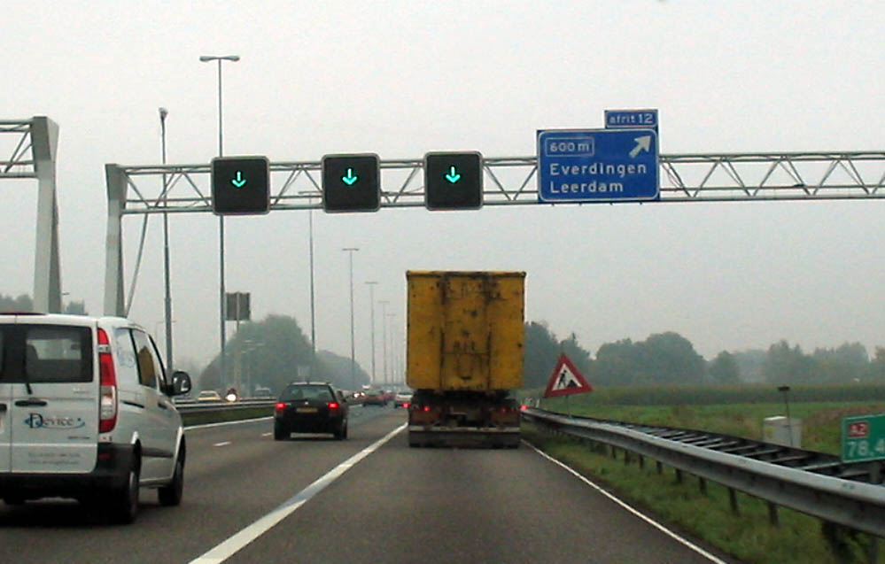 Spitsstrook A2 bij Everdingen, oktober 2005